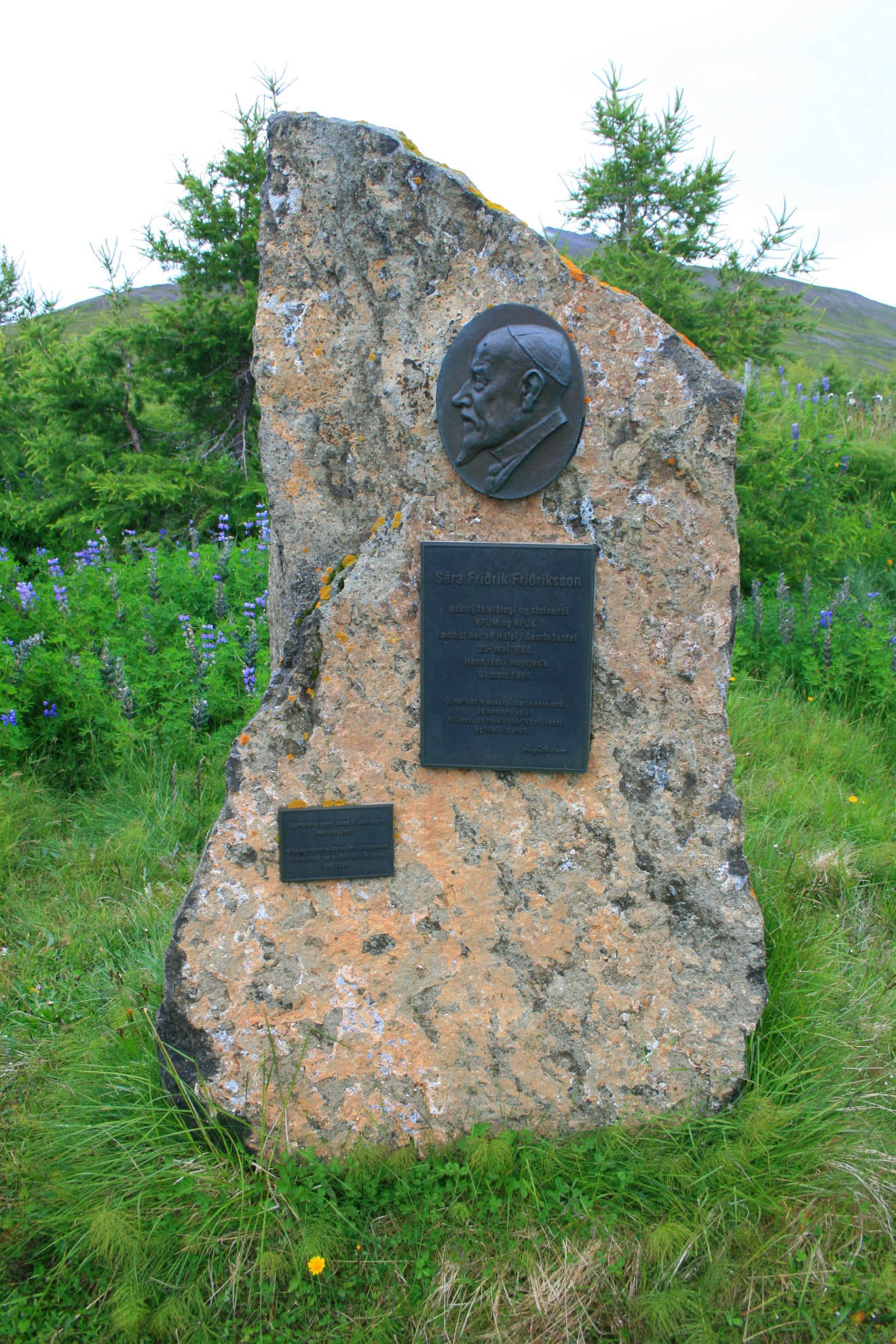 Minnisvarði um Sr.Friðrik Friðriksson hjá Hálsi í Svarfaðardal